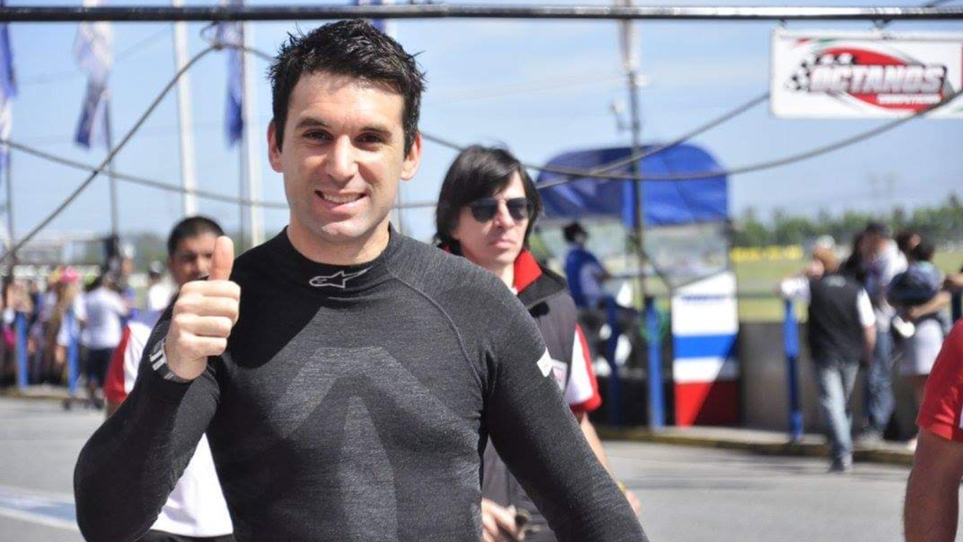 Bruno Boccanera, piloto argentino de automovilismo de velocidad. Bicampeón de Top Race Series 2017/2019